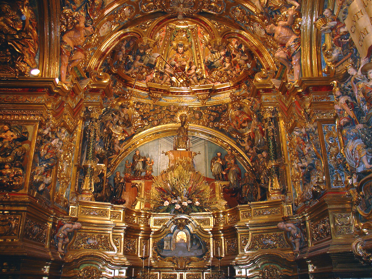 Església Parroquial de Sant Llorenç de Morunys, cambril de la Mare de Déu del Coll. Obra de Josep Pujol Juhí (1773-84).